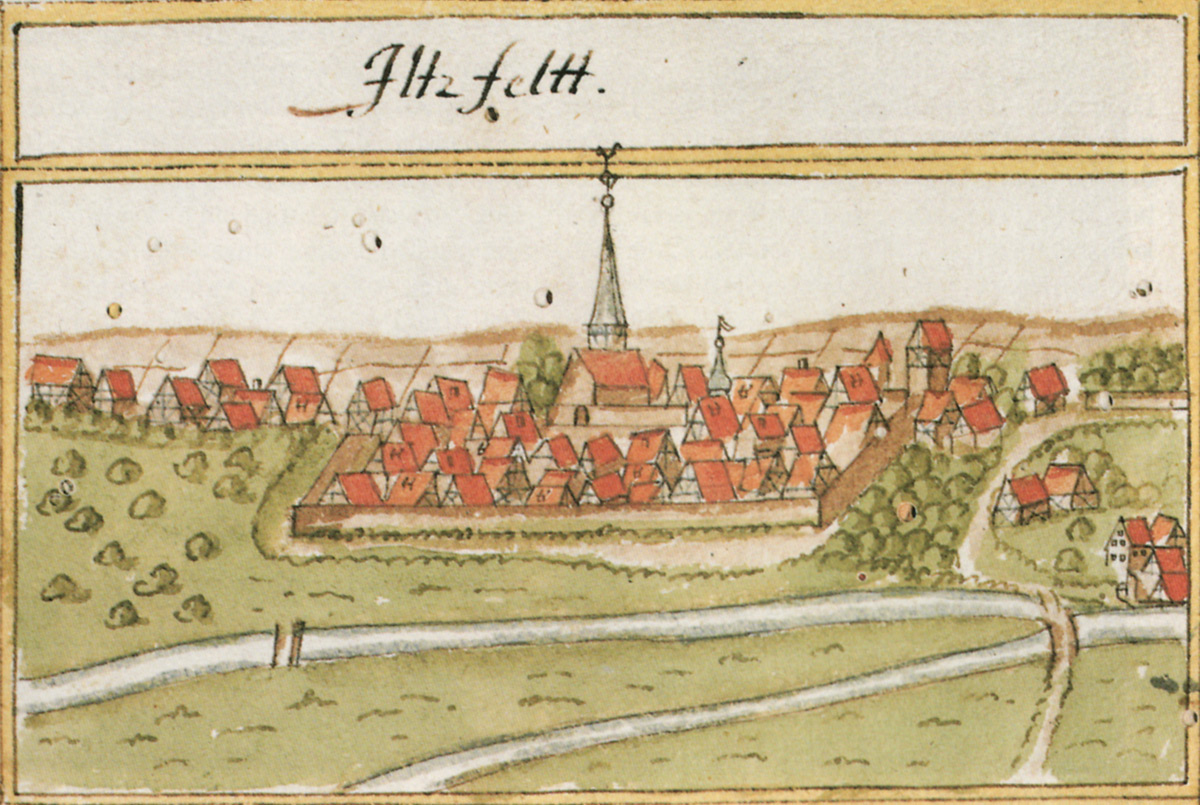 Ilsfeld 1685 in der Kieserschen Forstkarte